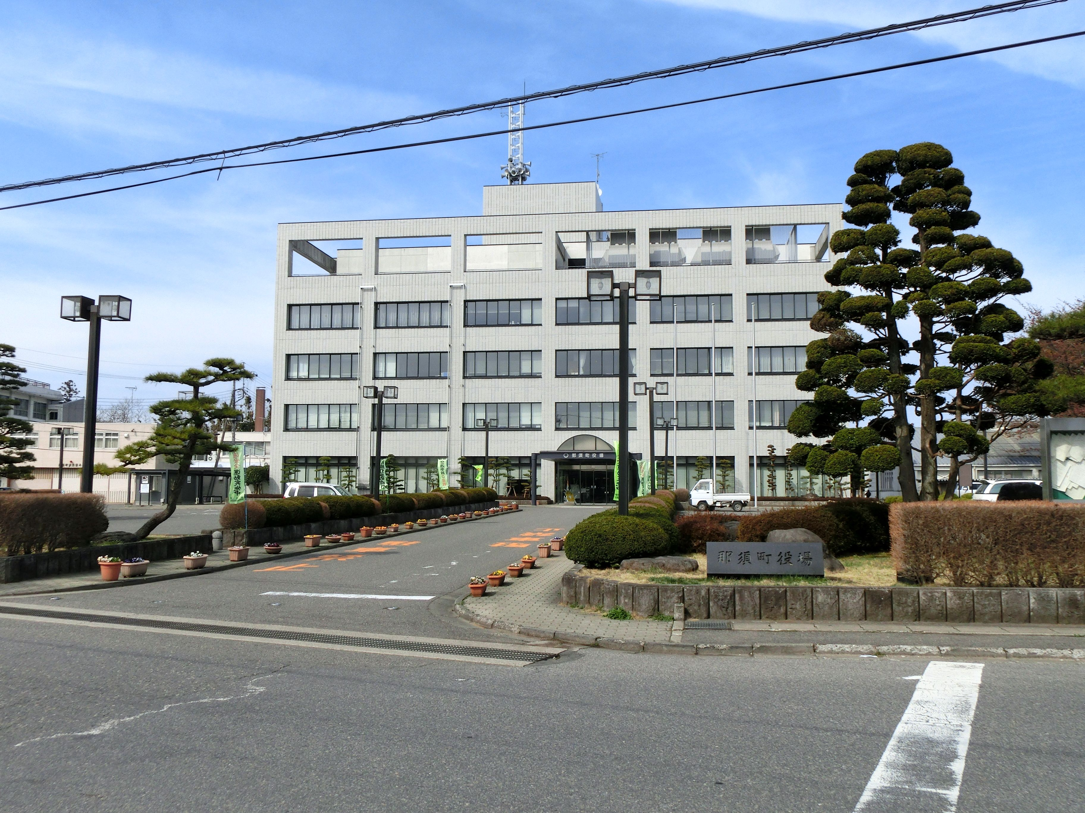 那須町役場